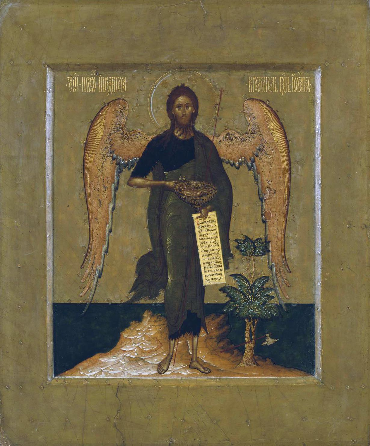 Icon. John the Baptist - Desert Angel. 1620-s Prokopiy Chirin (Stroganov School of icon-painting). Tretyakov Gallery, Moscow, Russia. Икона Иоанн Предтеча - Ангел пустыни. 1620-е гг. Прокопий Чирин (Строгановская школа иконописи) Государственная Третьяковская галерея